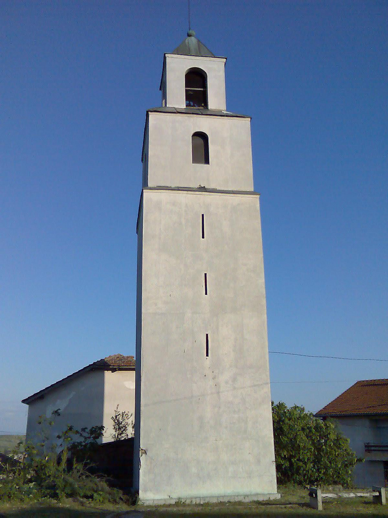 Кула в град Свети Никола, Република Македония.